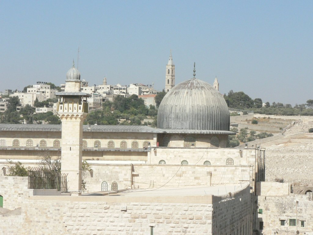 Al-Aqsa Mosque, Jerusalem, Israel - view toward east מסגד אל-אקצא, ירושלים, ישראל - מבט מזרחה